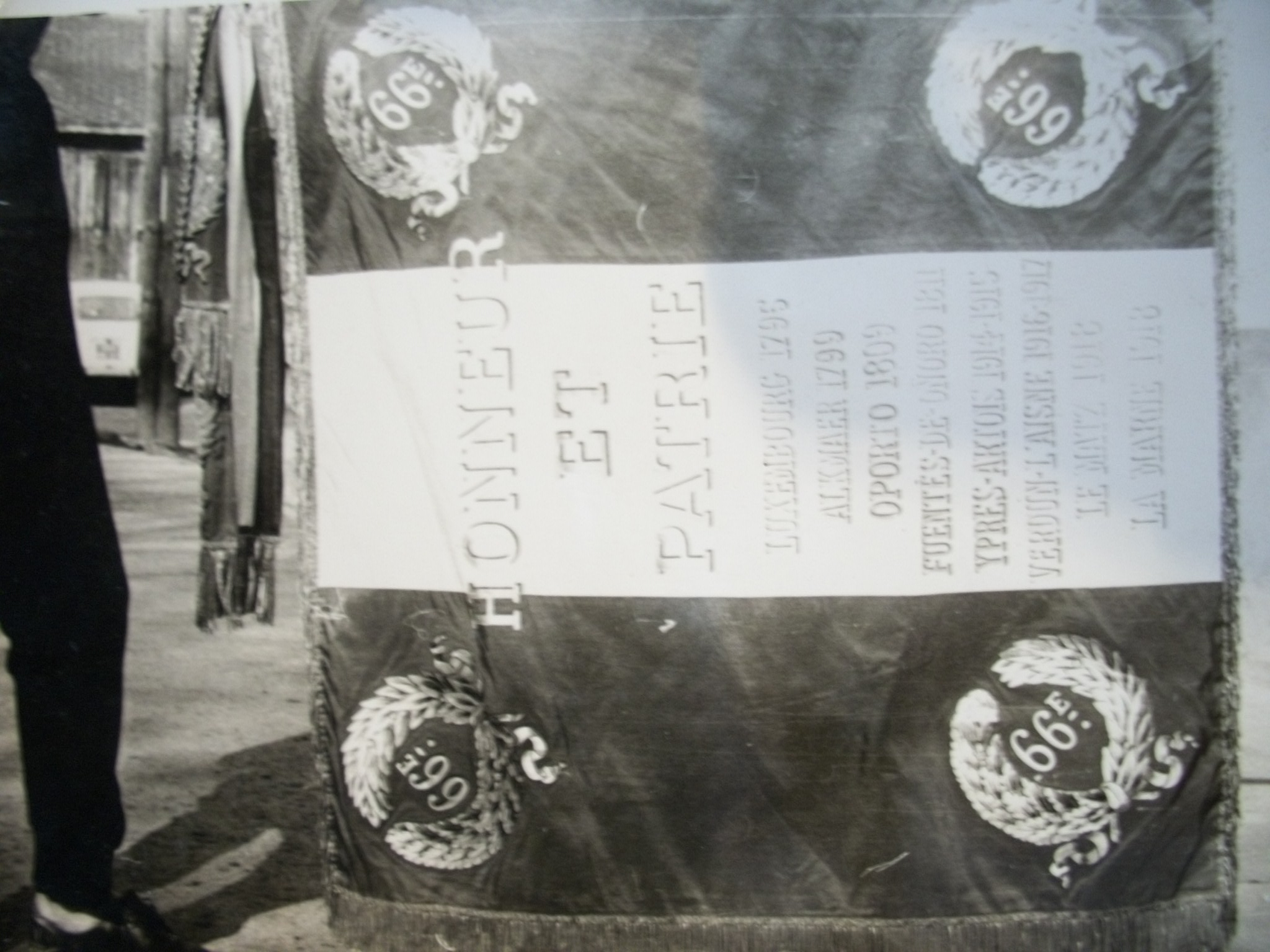 Photo originale du drapeau du 66e régiment d'infanterie entre 1963 et 1966.